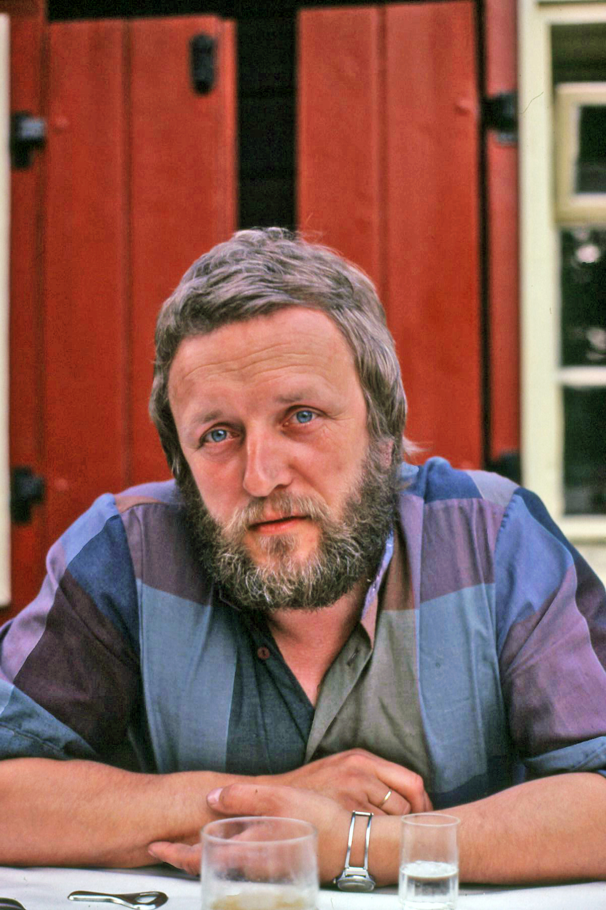 Frank Hörnigk in Rahnsdorf